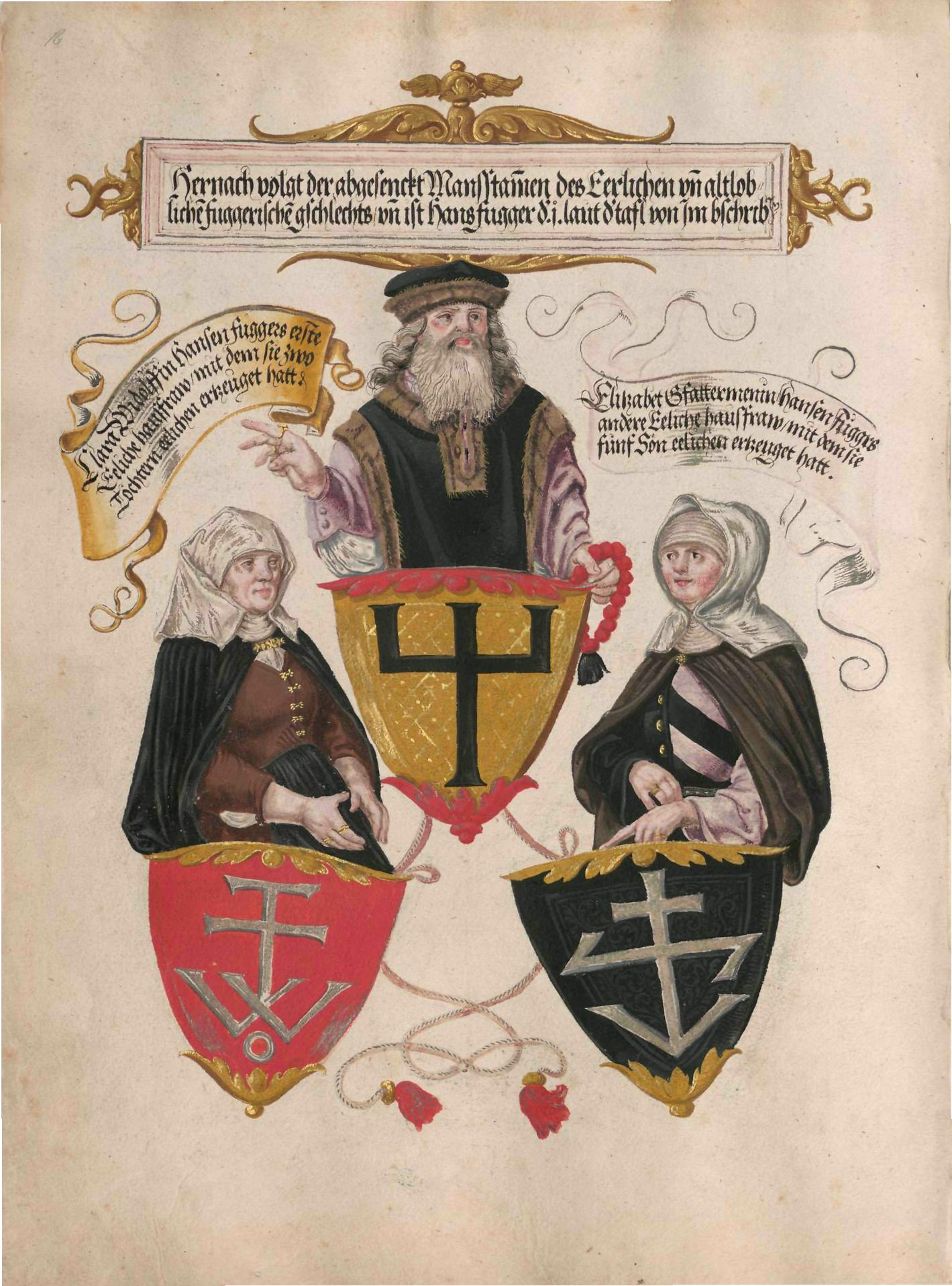 Geheimes Ehrenbuch der Fugger, hergestellt in der Werkstatt Jörg Breu d. J., 1545–1549 Portrait- und Wappendarstellung